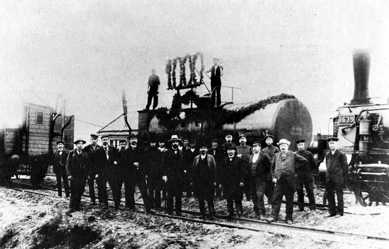 1000. Ölwaggon in Witze, Landkreis Celle